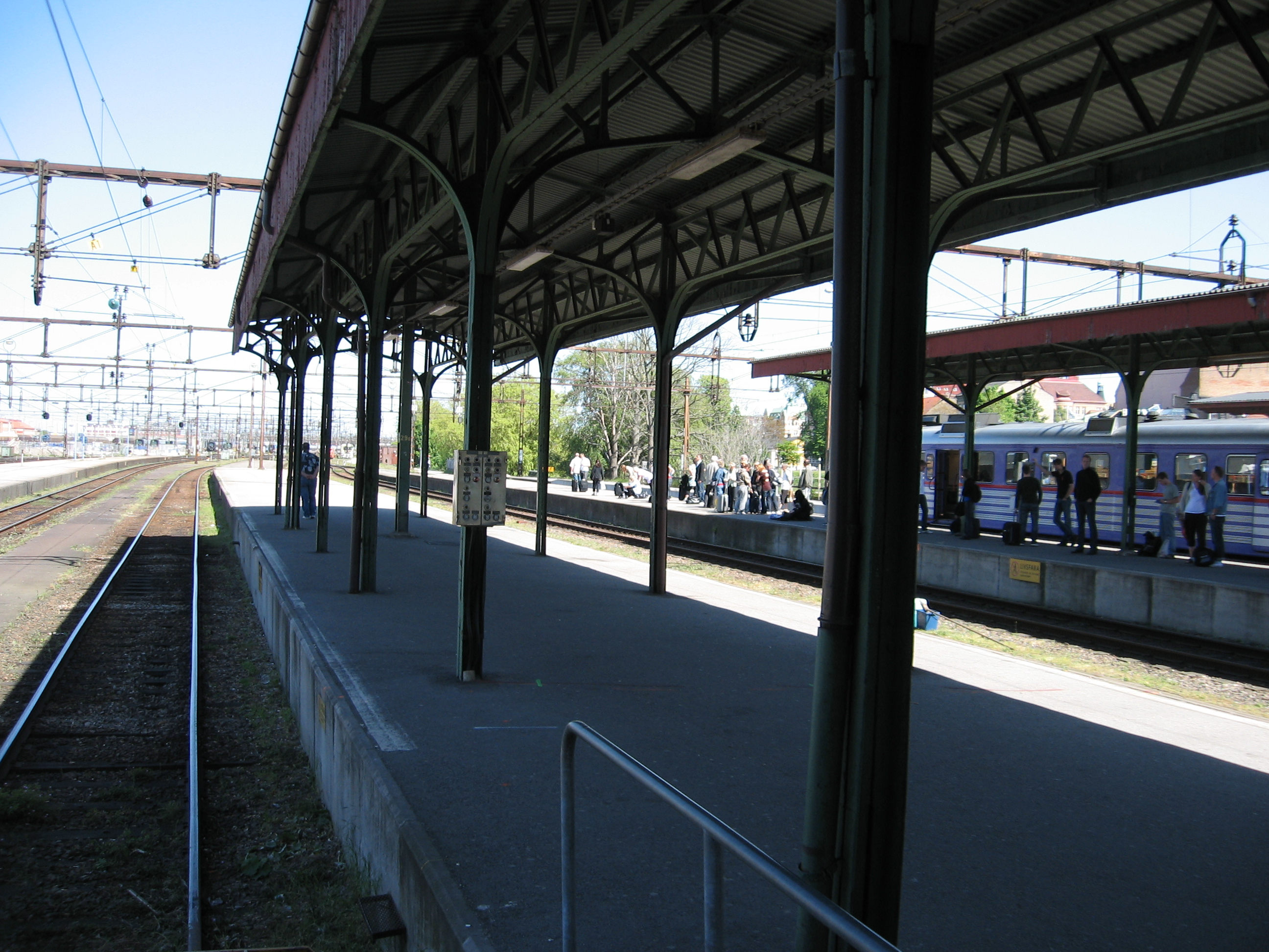 Malmö C, skärmtak